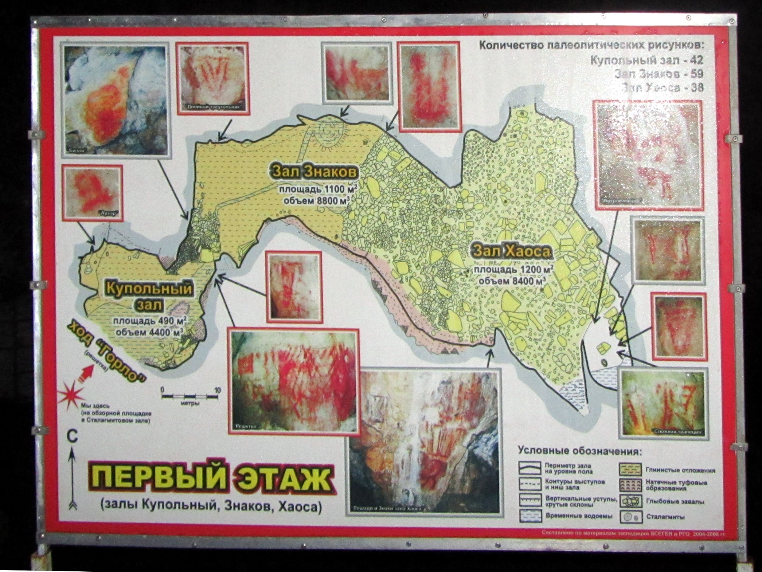 Башҡортса: Шүлгәнташ мәмерйәһенең беренсе ҡаты схемаһы